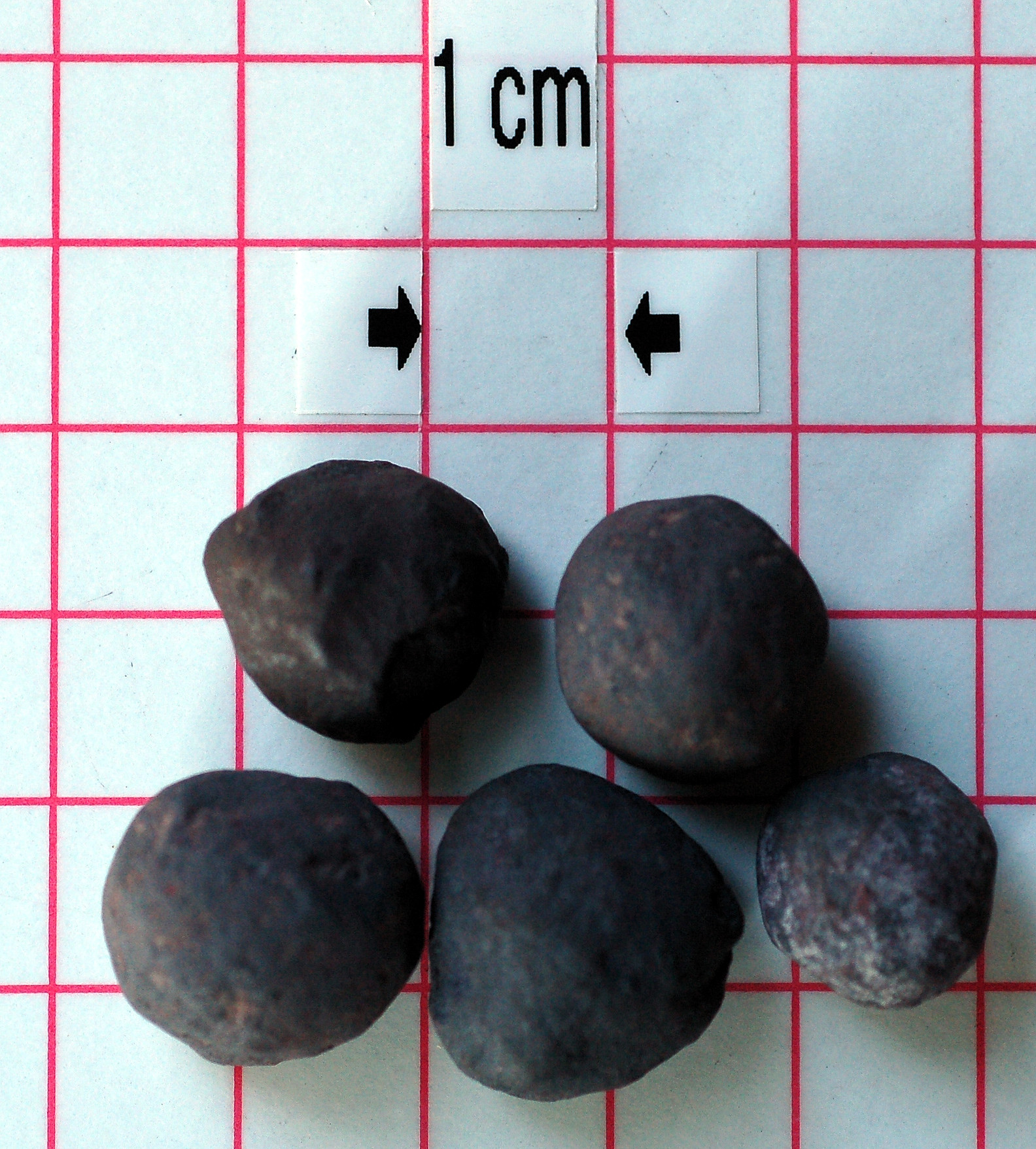 Erzpellets, Grube Kiruna, LKAB